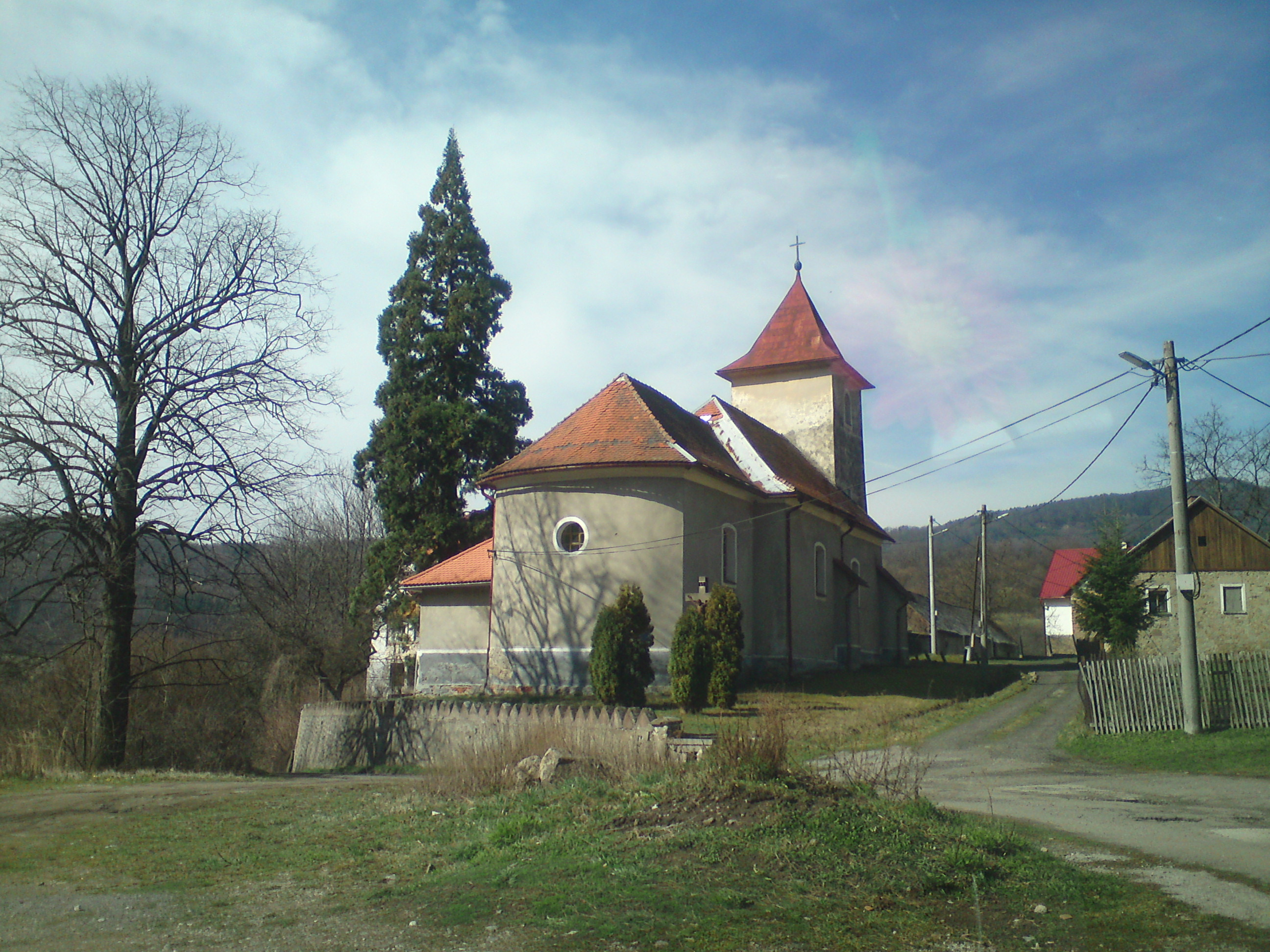 Kostol v mestskej časti Nová Lehota; vľavo exotická sekvoja